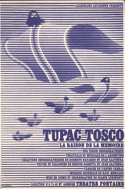 Tupac Tosco, la raison de la mémoire ; une vision chorégraphique, théâtrale et musicale de l'Argentine ... Théâtre Fontaine Affiche Hector Cattolica